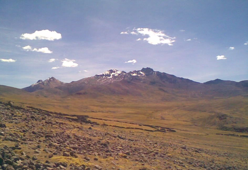 Nevado Ccarhuarazo